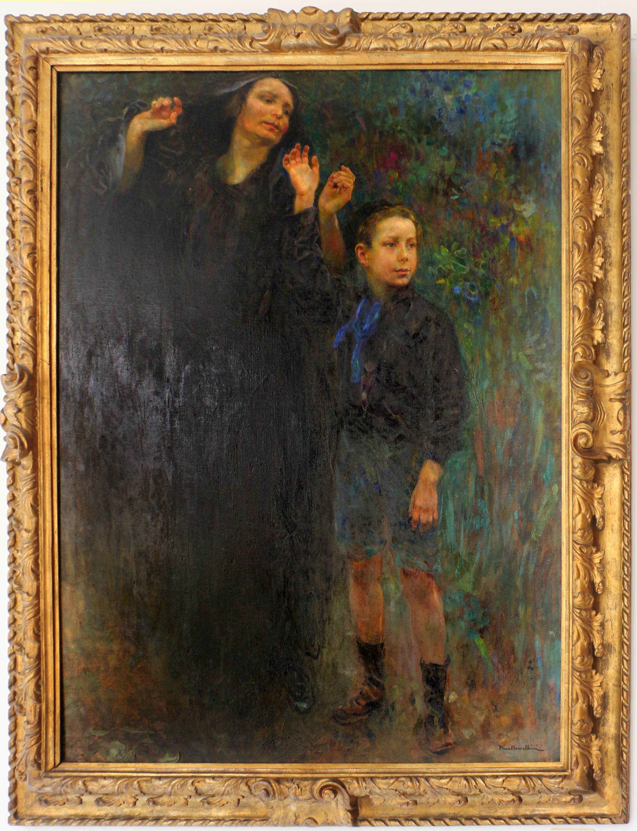 detail